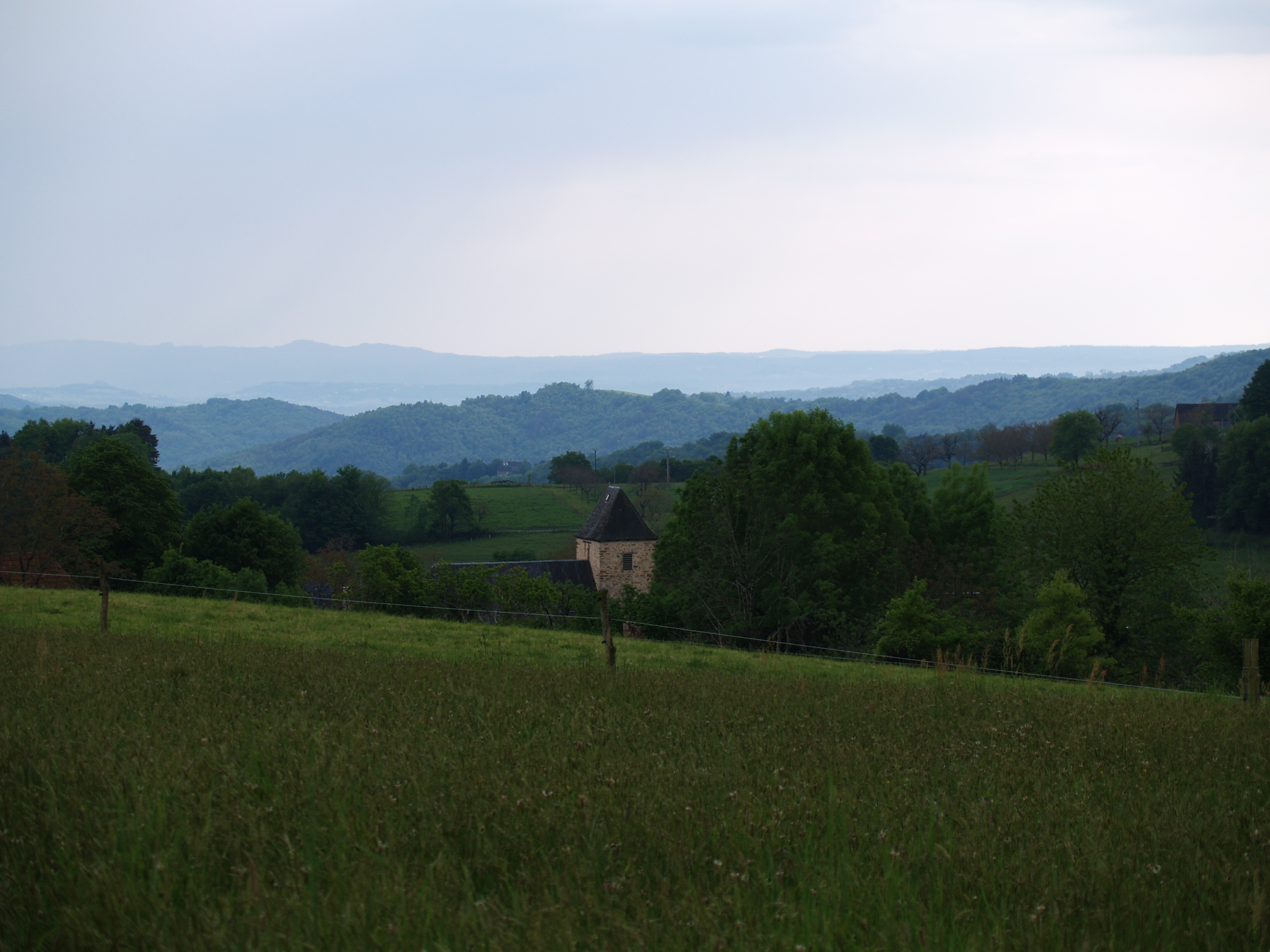 Eglise et vallée...